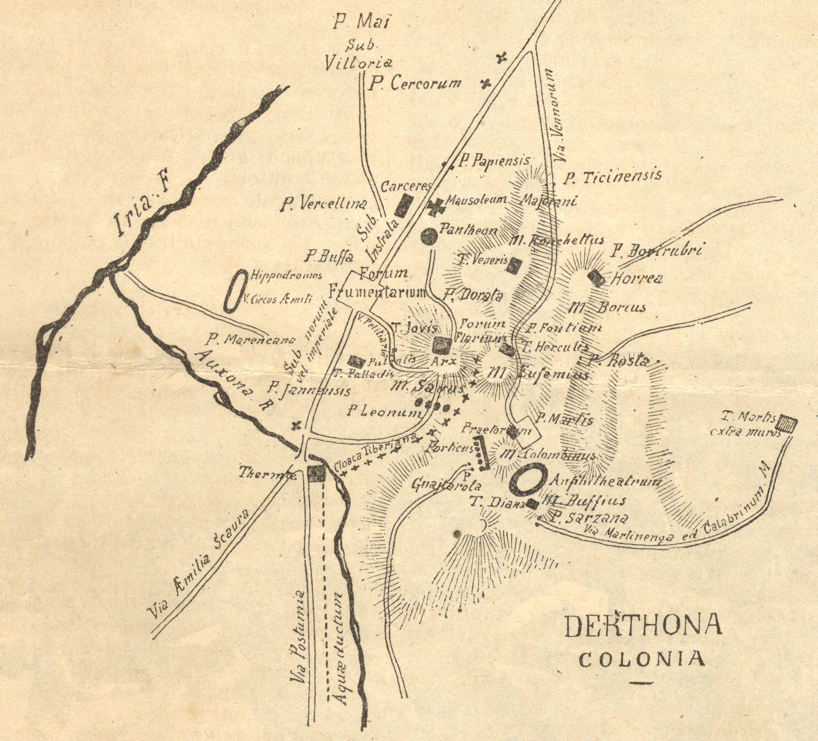 divulgata antes MCM / published before 1900